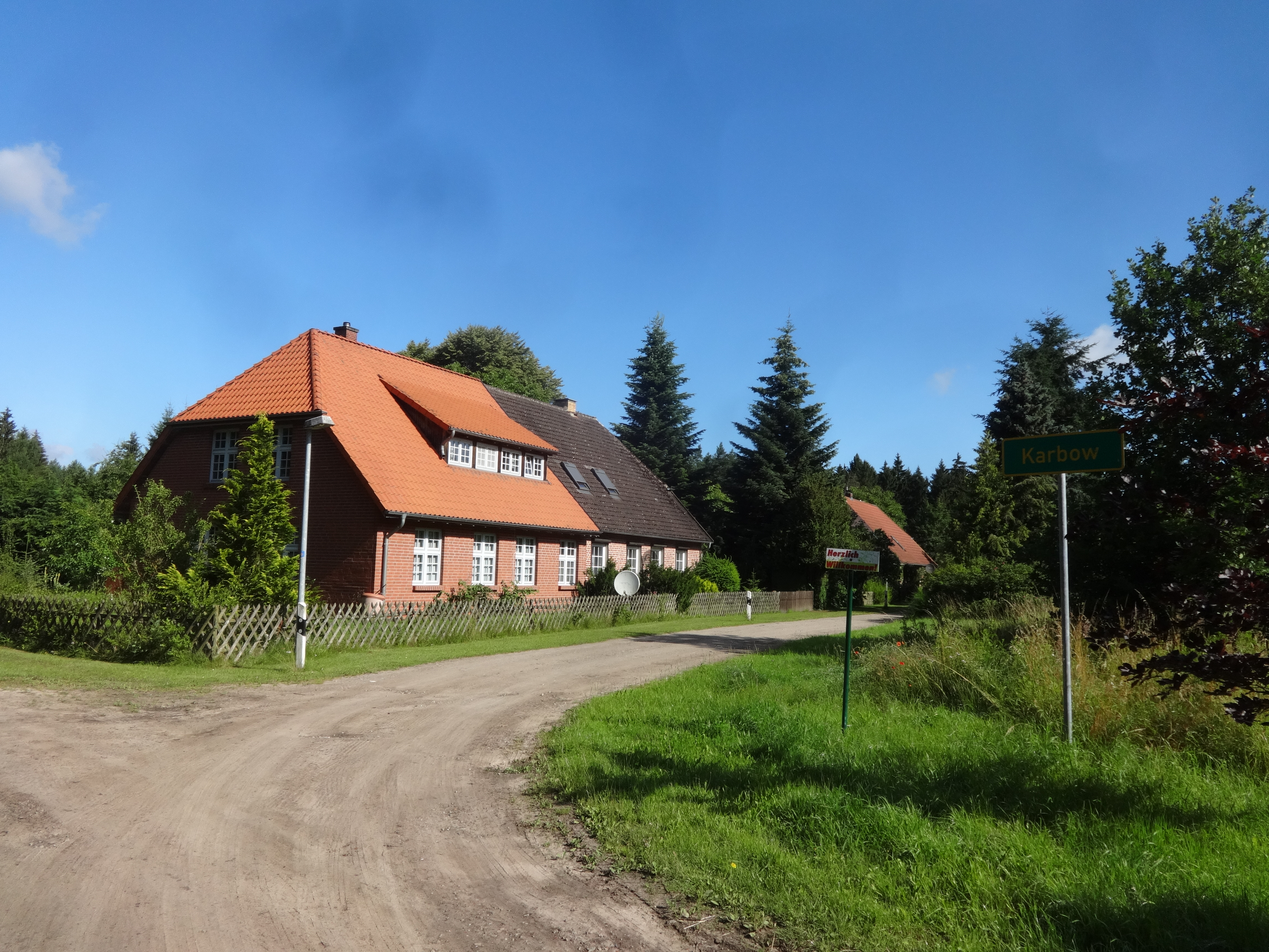 Karbow, ein Ortsteil der Gemeinde Neu Boltenhagen im Landkreis Vorpommern-Greifswald